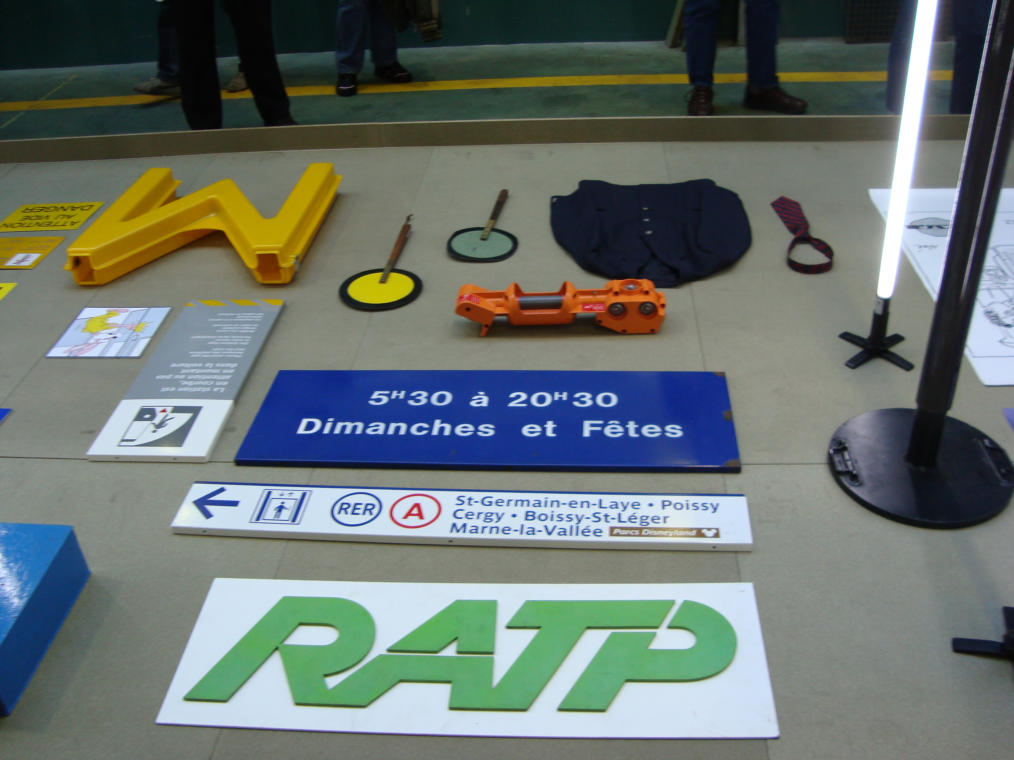 Le panneau qui a longtemps indiqué la fermeture à 20h30 de la station